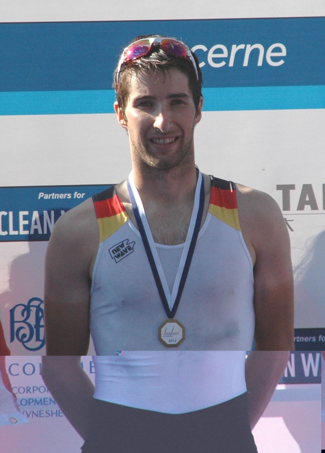 Jonathan Koch, Rowing Worldcup Lucerne June 2012